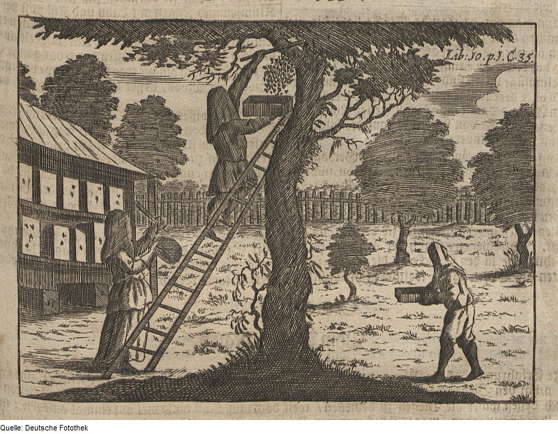 Original image description from the Deutsche Fotothek Landwirtschaft & Nutztierhaltung & Biene